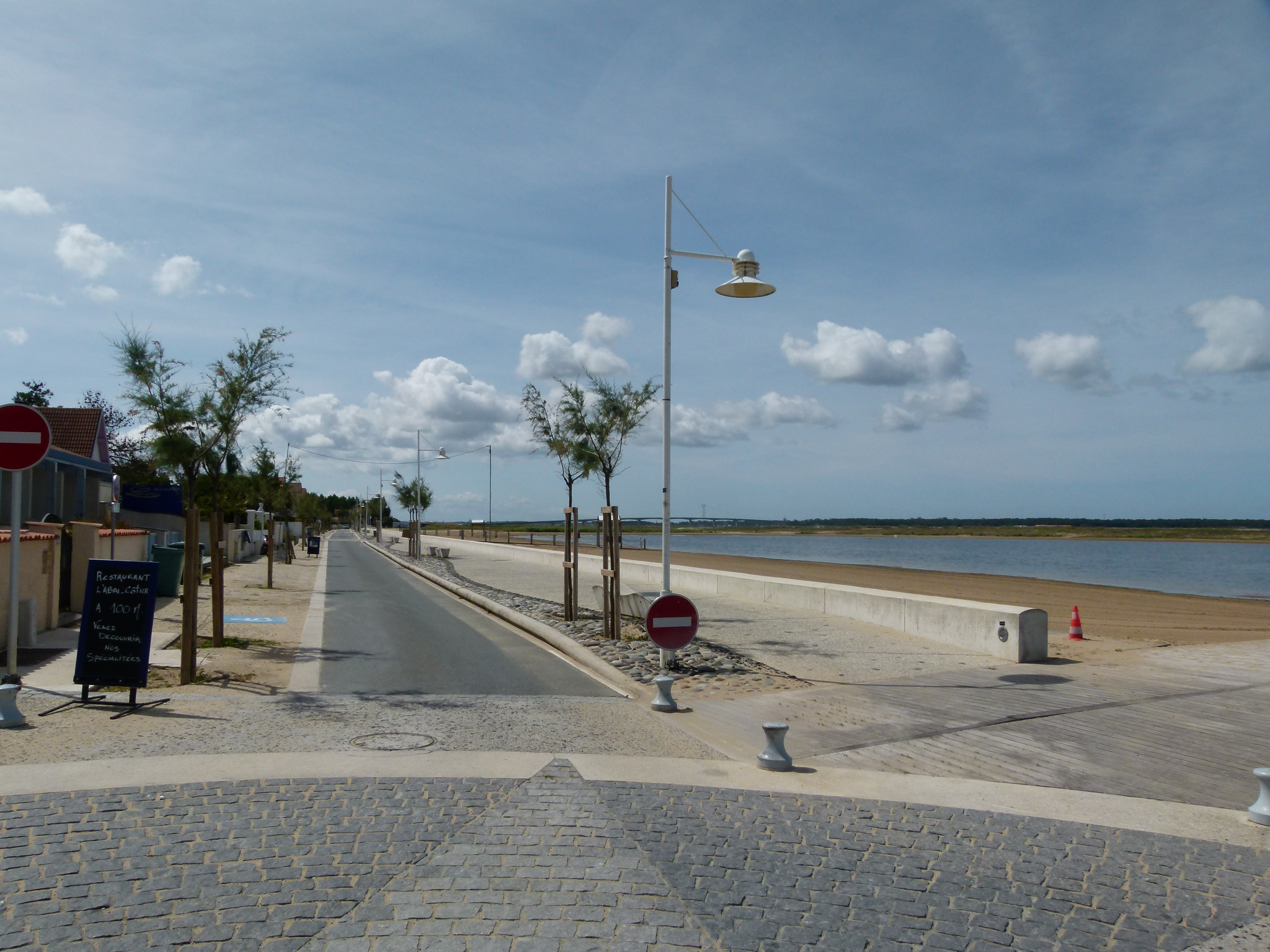 Le site de Marennes-Plage avec vue sur le boulevard nouvellement aménagé et l'estuaire de la Seudre (en Charente-Maritime).